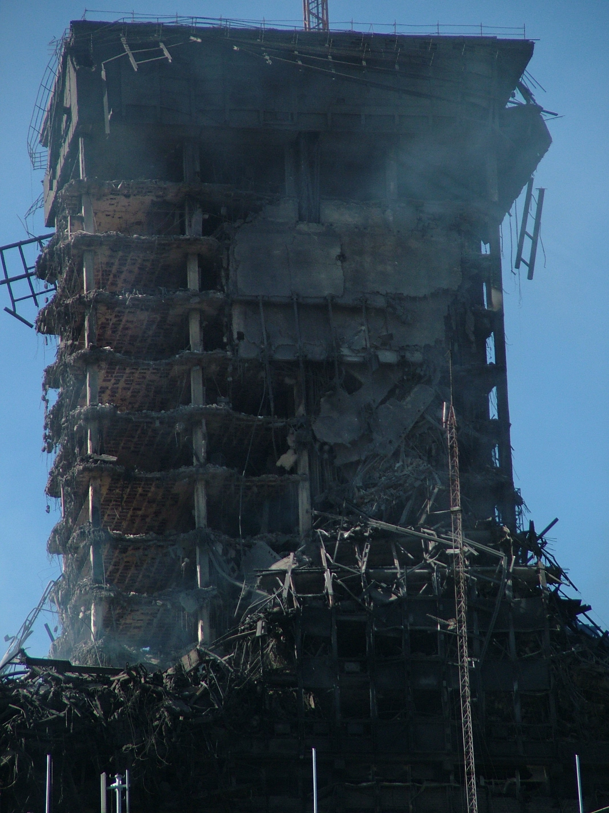 Edificio Windsor (4)